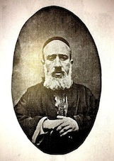 Rabbi Méir Tolédano